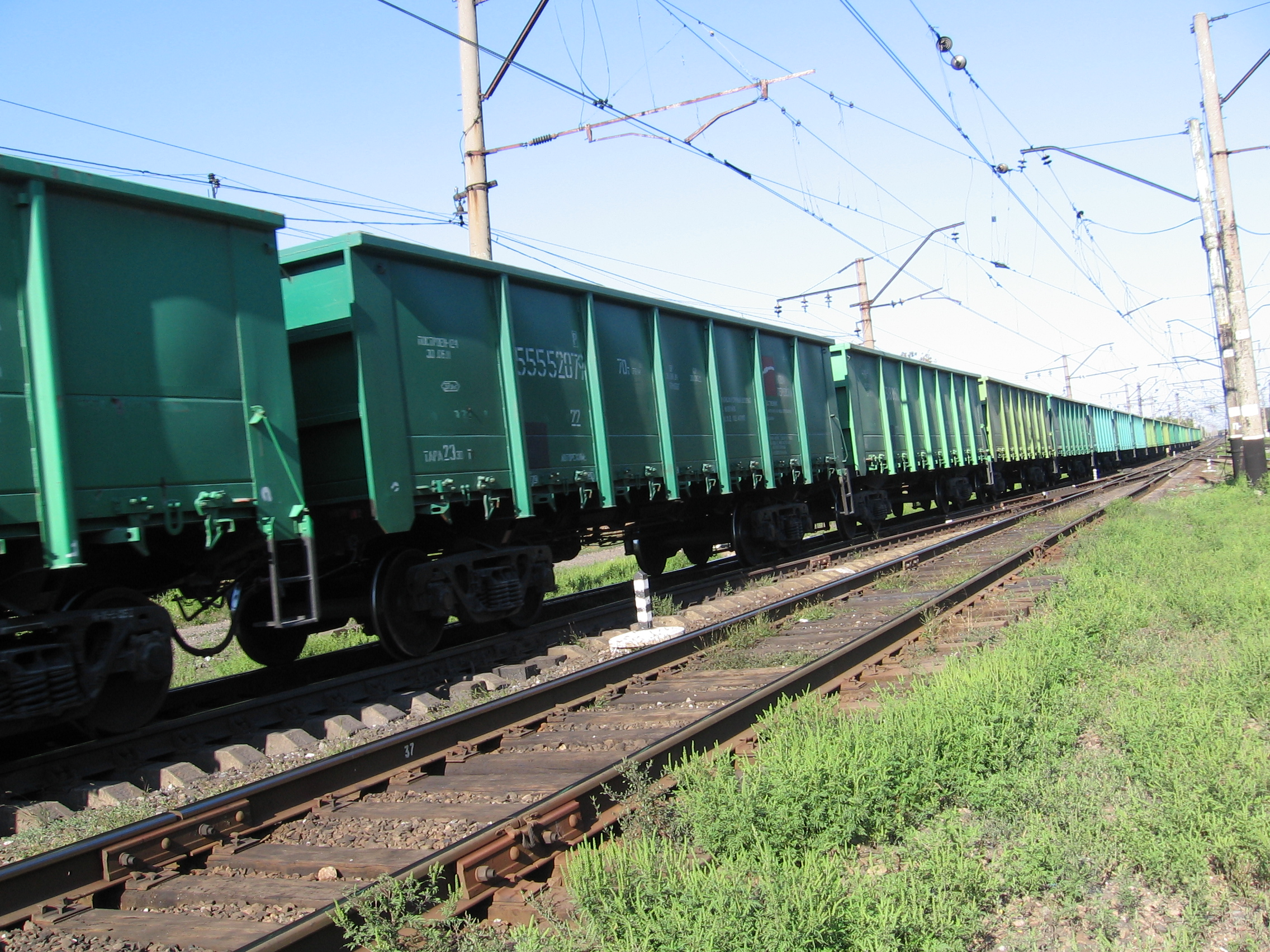 Вантажний потяг